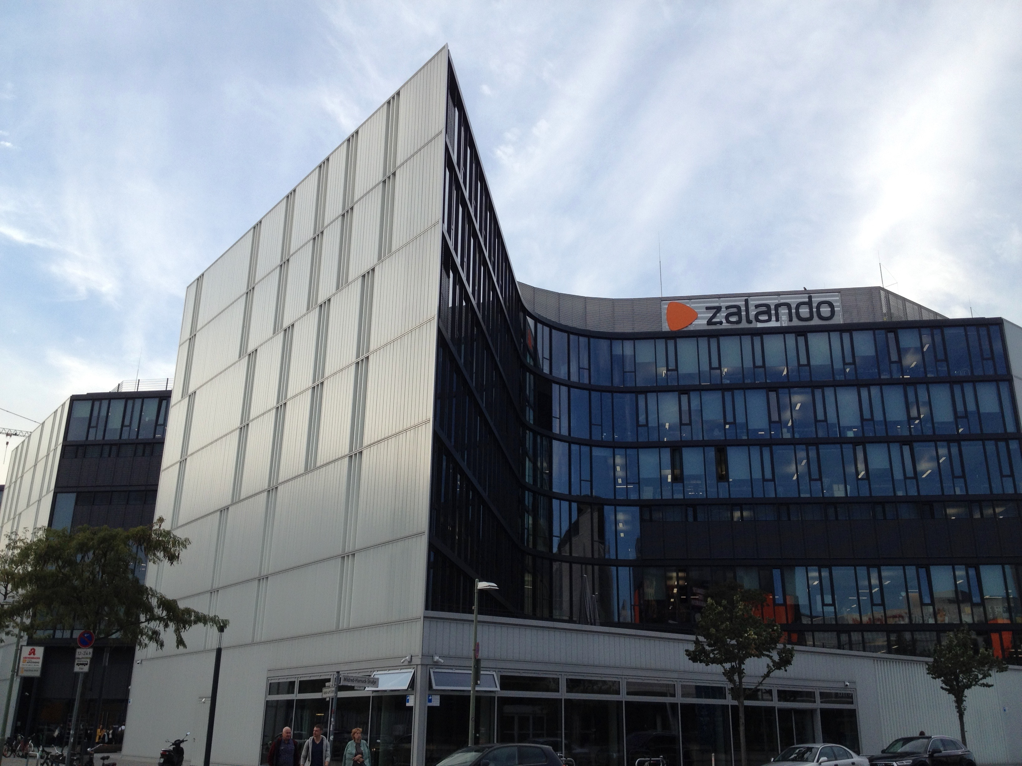 Firmensitz von Zalando in Berlin, Deutschland